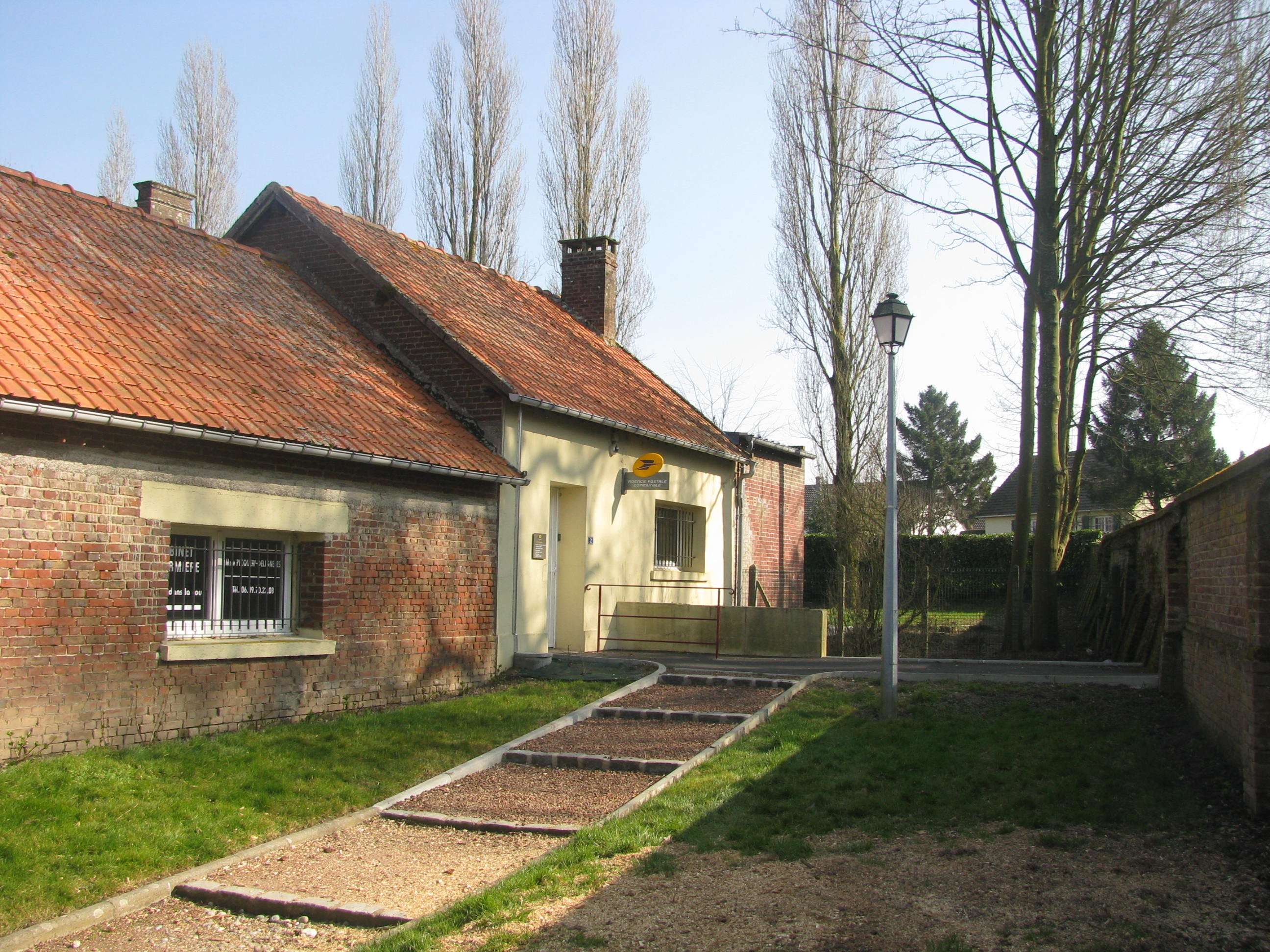 Agence postale communale Chepy